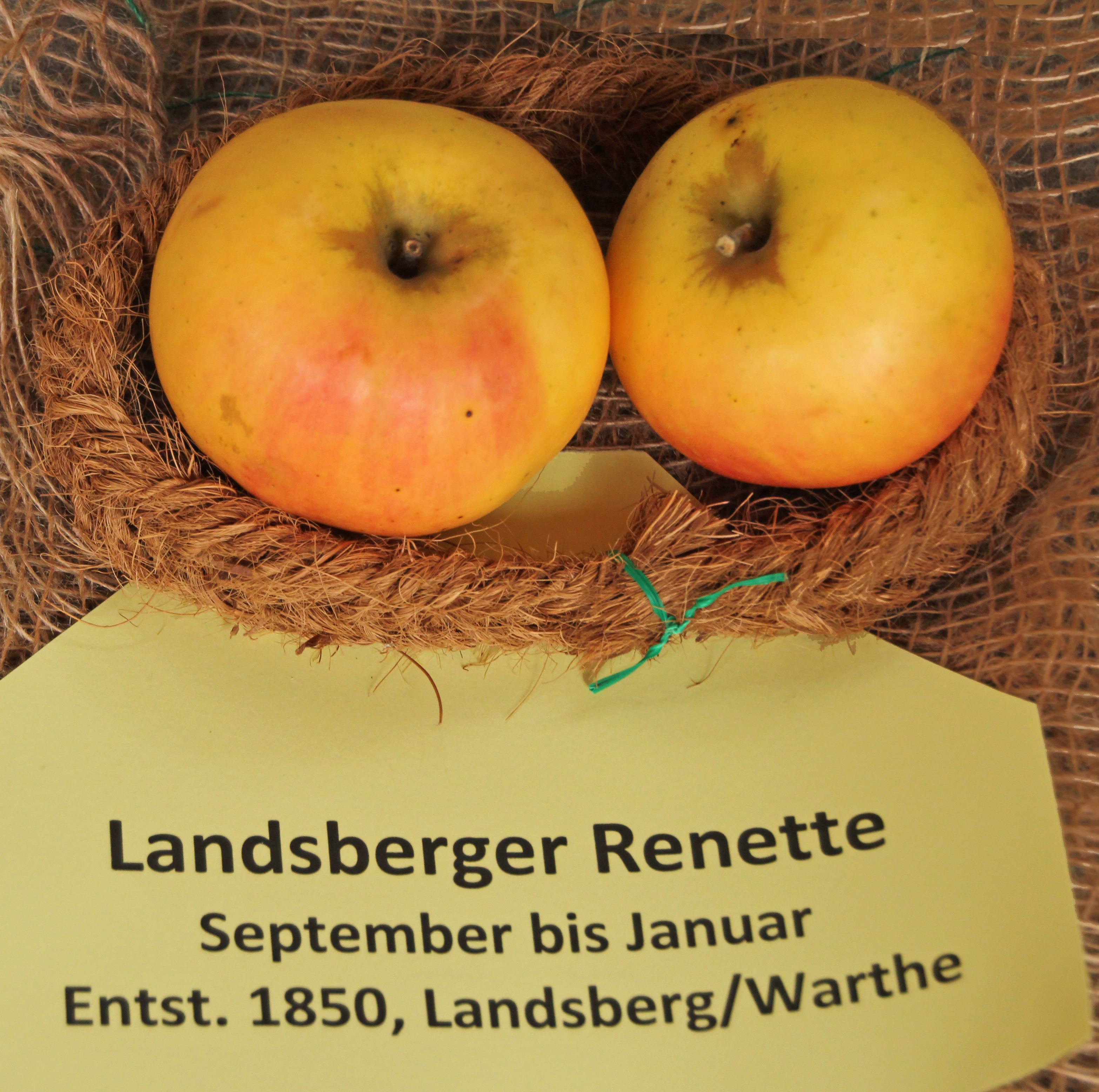 Bildinhalt: Äpfel der Sorte "Landsberger Renette" mit Beschriftung Aufnahmeort: Frankfurt am Main, Deutschland